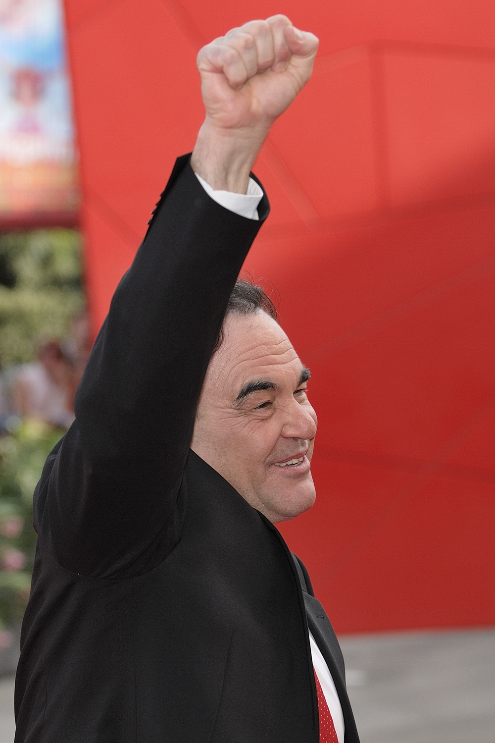 66ème Festival du Cinéma de Venise (Mostra), 6ème jour (07/09/2009) Hugo Chavez Le président du Venezuela a volé la vedette aux stars de cinéma après la projection de South of the border, un documentaire au ton hagiographique où l'Américain Oliver Stone défend sa révolution pacifiste